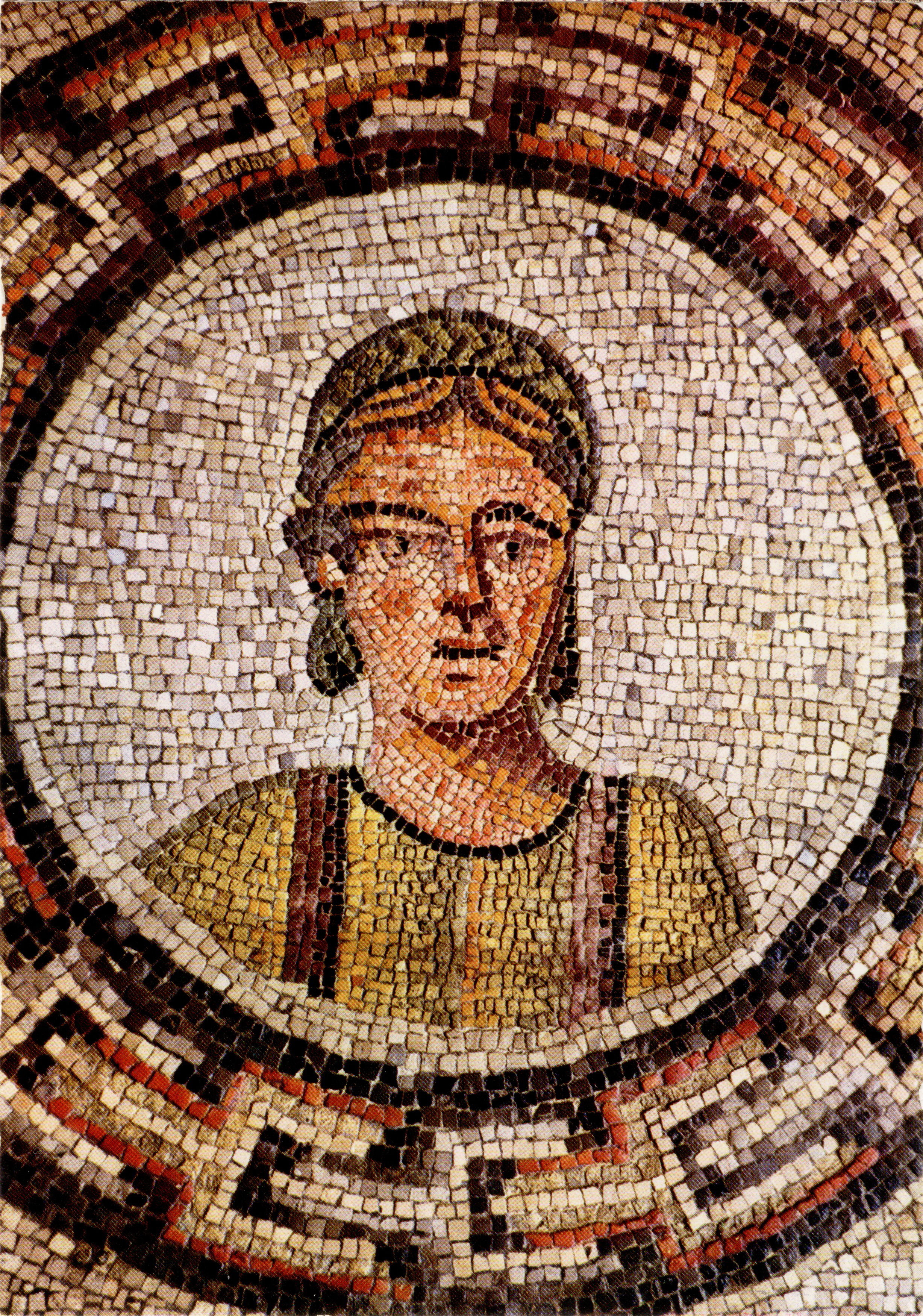 Aquileia - Basilica - Mosaico con raffigurazione di una benefattrice